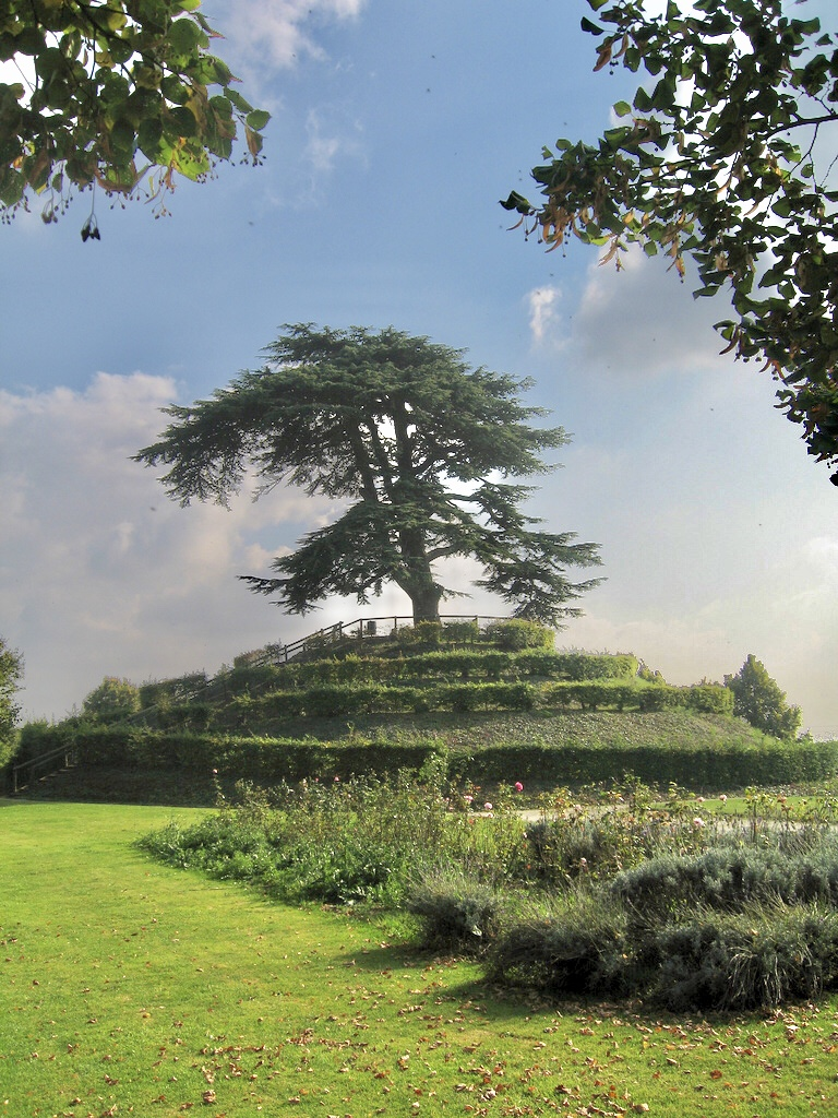 Cèdre du Liban planté en 1849 par les chanoinesses régulières qui assuraient les soins à l’Hôtel-Dieu, installé dans l'abbaye en 1823, afin de commémorer les massacres des chrétiens maronites au Liban en 1845.